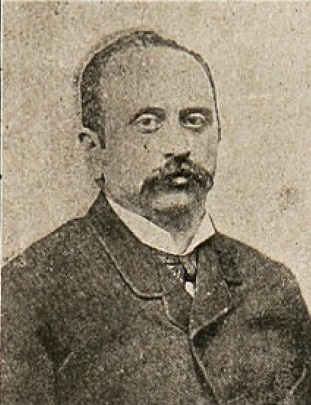 Manuel Arriarán, filantropo chileno.